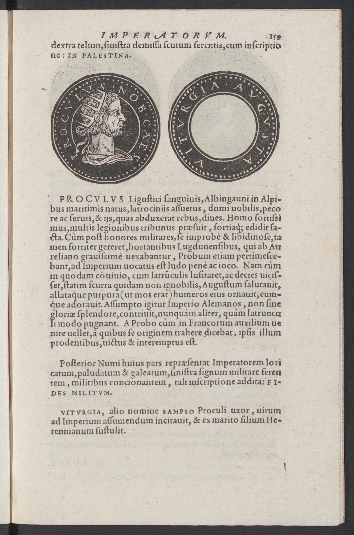 Portrait fictif de Proculus dessiné par Jacopo Strada dans la version latine de son ouvrage Epitome thesauri antiquitatum, hoc est, impp. Rom. Orientalium et Occidentalium iconum, imprimé en 1557. Livre numérisé sur E-rara